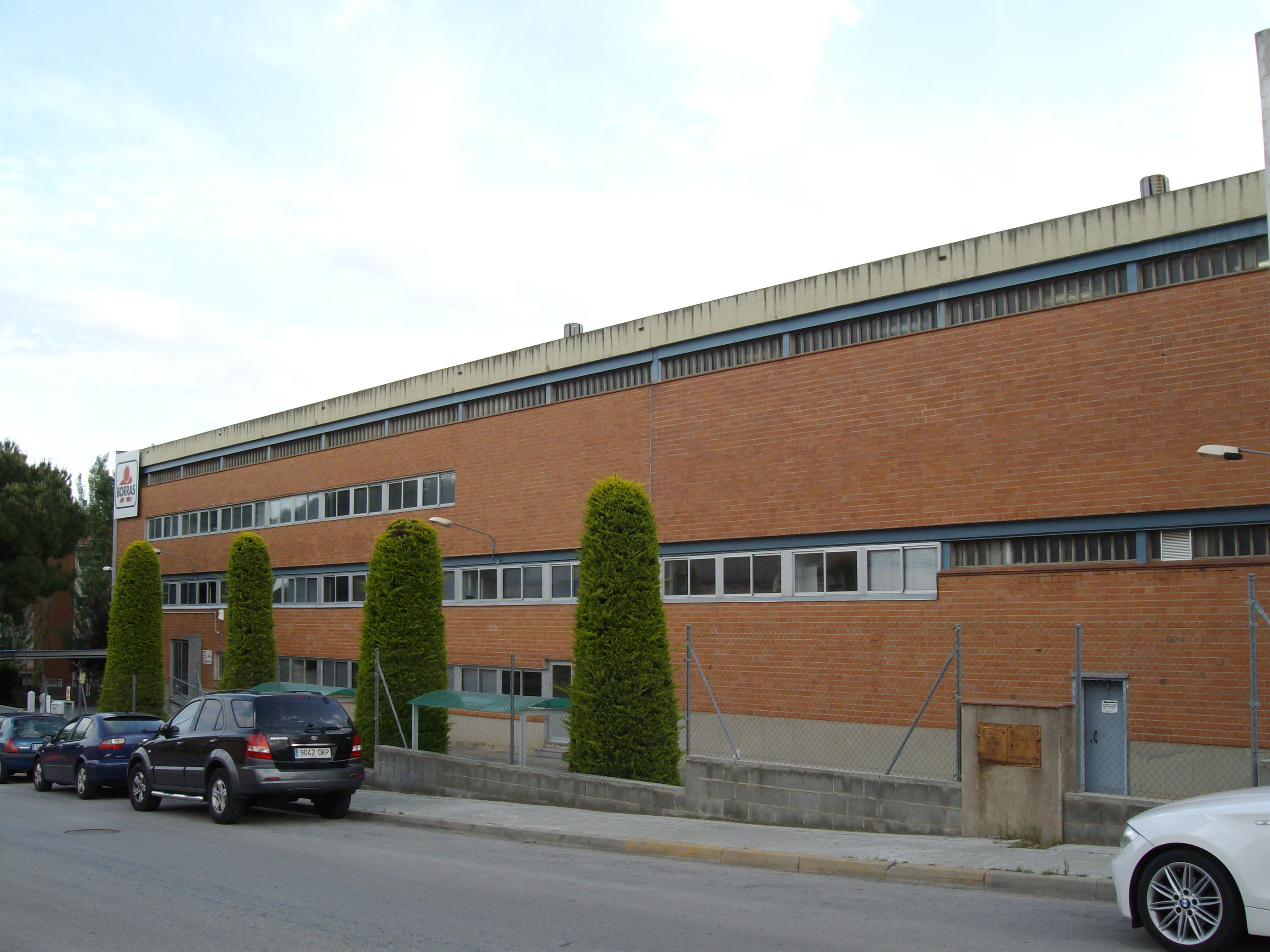 Fábrica de juguetes Educa Borras. Sant Quirze del Vallès, Barcelona (España).